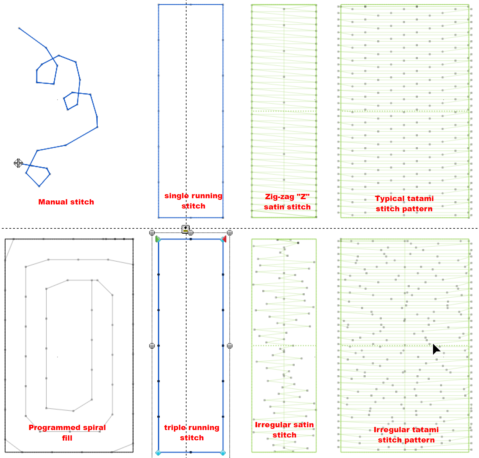 Základní druhy stehů a jejich varianty pro počítačové programy k vyšívacím strojům